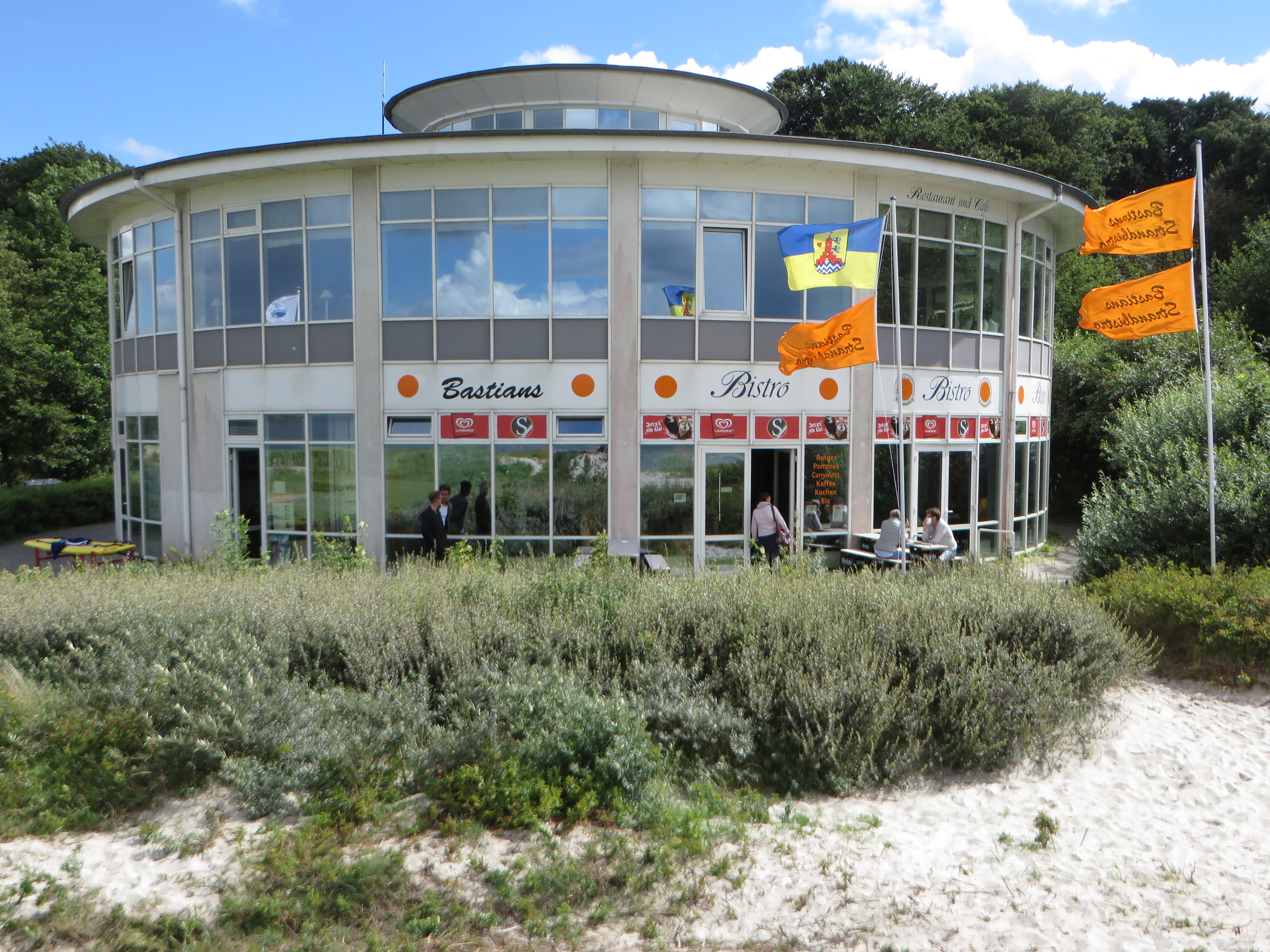 Solitüde-Pavillon (Flensburg-Mürwik 6 August 2016), Bild 04